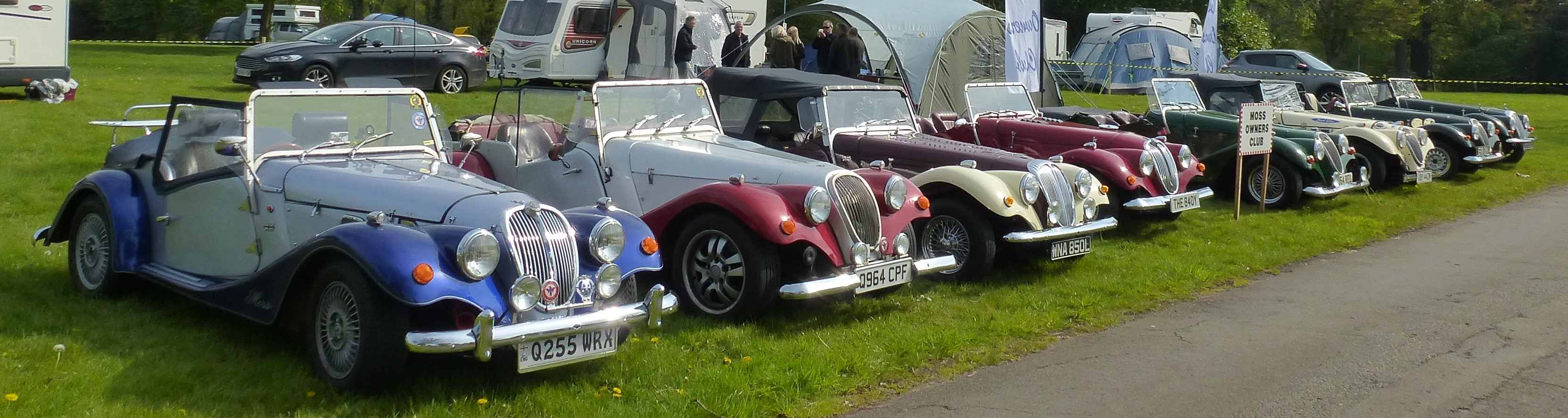 Moss